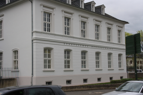 Das ehem. staatliche Behördenhaus in der August-Klotz-Straße in Düren